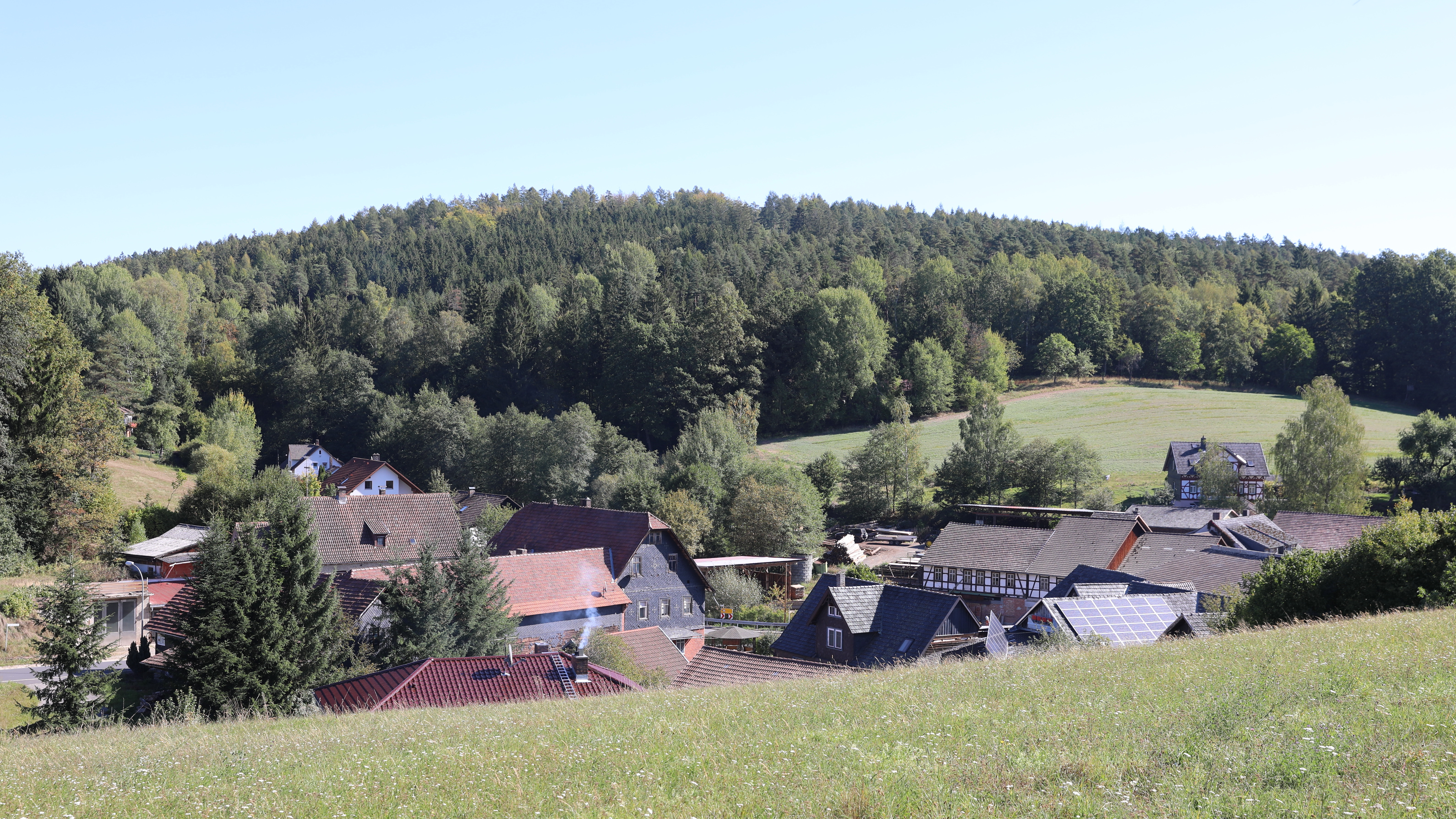 Westansicht Tremersdorf, Ot Lautertal